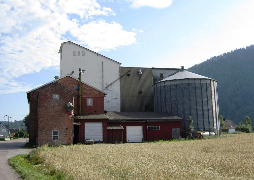 Kvelde mølle